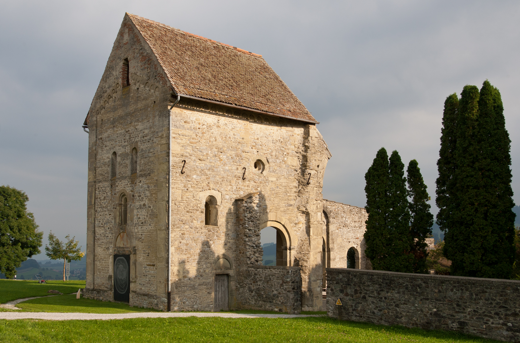 Ein Teil der Ruine der Cluniazenser Kirche in Rüeggisberg